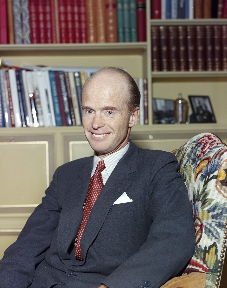 Fred. Olsen (1929–), skipsreder.